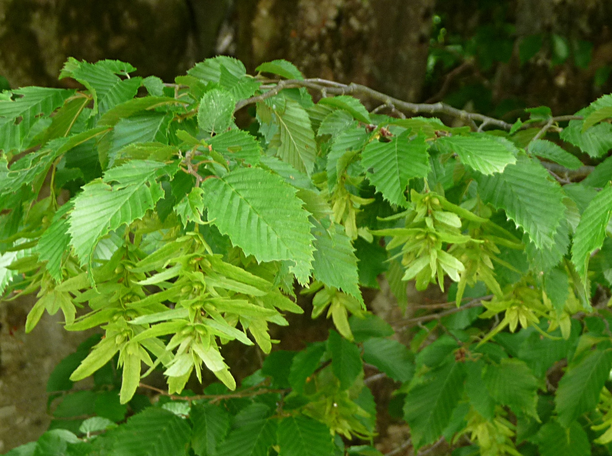 Hainbuche in Oberfrauenau